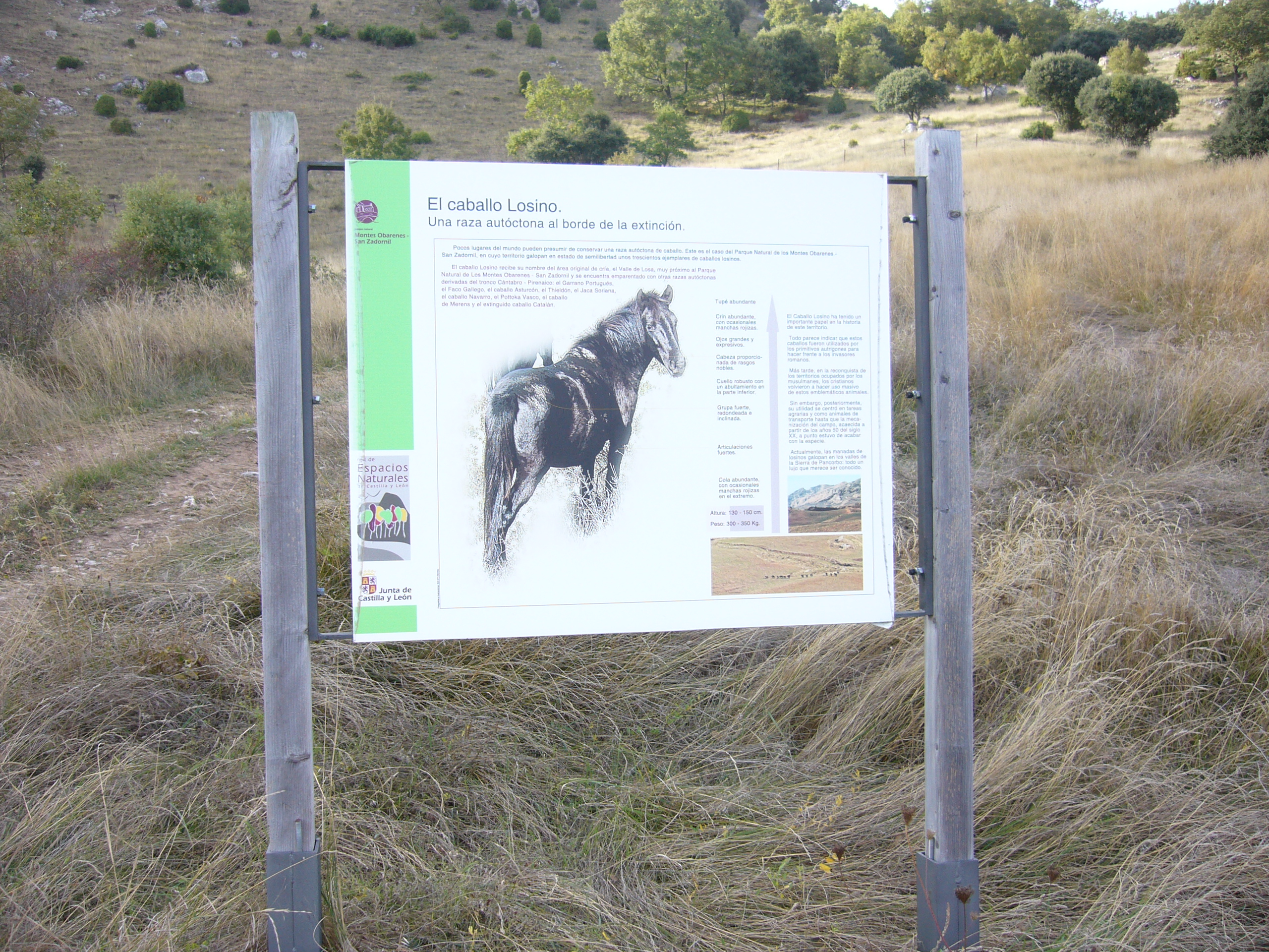 Pancorboko babesgunearen informazio gartzela